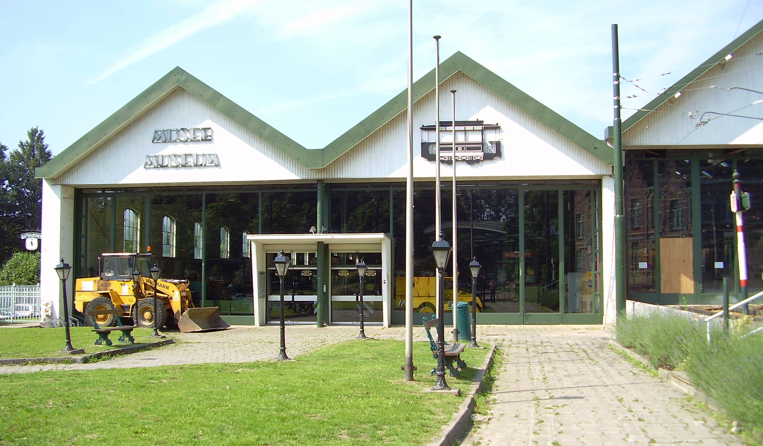 Description: Musée du tram bruxellois, Woluwe-Saint-Pierre (Bruxelles) Author: User:Ben2 Date of creation: 29 juin 2006 Source: Photo personnelle